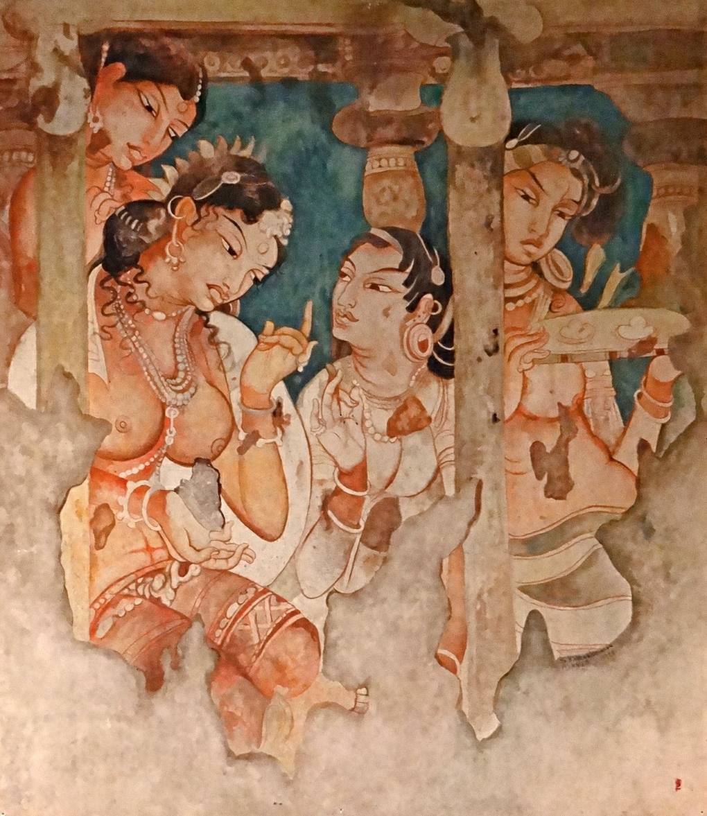 Copie des peintures murales d'Ajantâ (grottes 1 et 2). La conversion de Nanda. La femme de Nanda, la reine Janpada-kalyani a été informée que son mari, alors qu'il est roi, est allé à la porte du palais pour demander l'aumône. La reine est profondément troublée par cet événement et se demande comment retrouver l'attention de son mari. Sibi jataka. Grotte n° 1, probablement du début du 6e siècle.